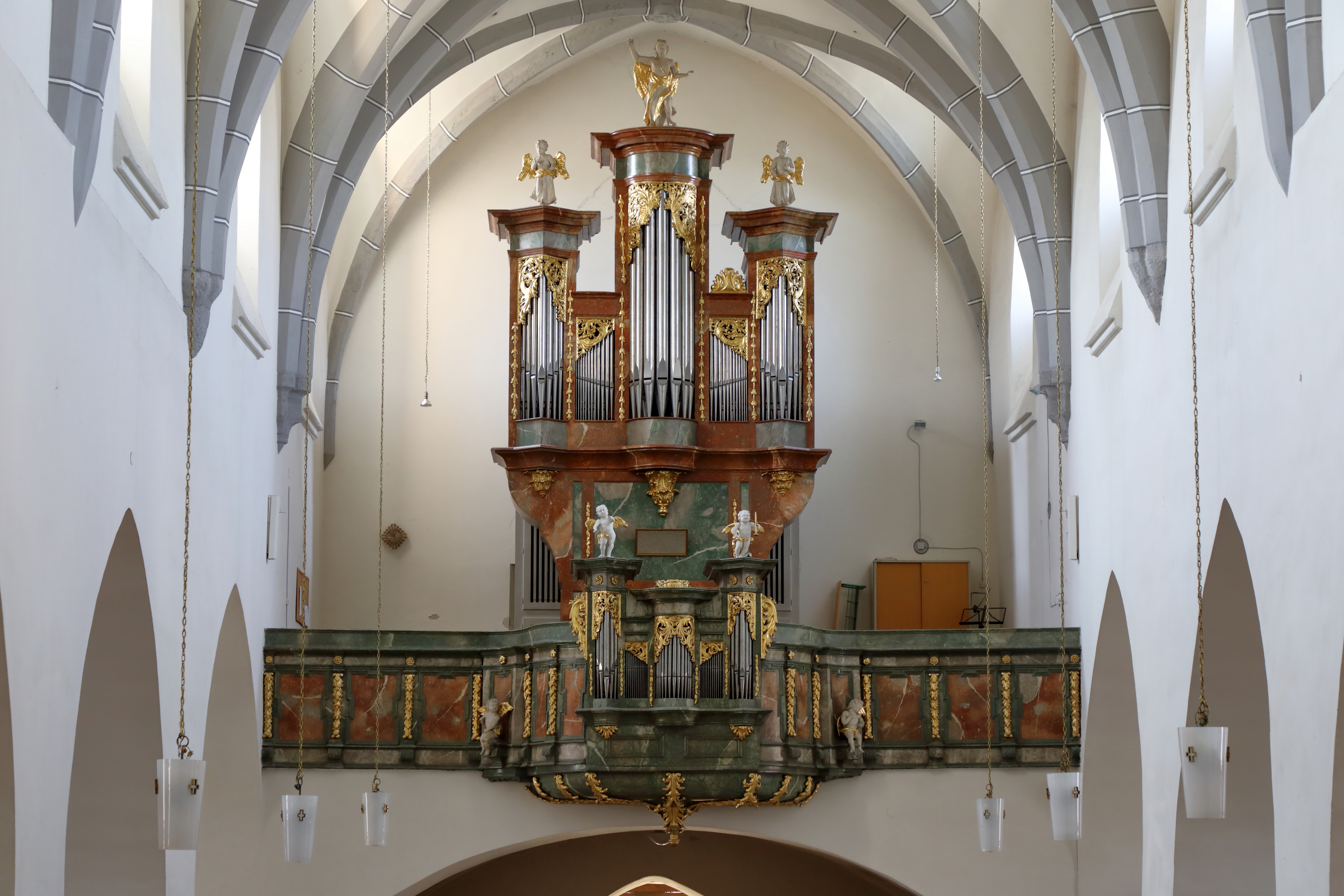 Die Orgel der röm.-kath. Pfarrkirche hl. Veit in der niederösterreichischen Stadt Laa an der Thaya. Die Orgel mit reichem Akanthusschnittwerk ist ein Werk von Christoph Pürner aus dem Jahr 1728. Im Jahr 1978 wurde von dem oberösterreichischen Orgelbauer Bruno Riedl ein neues Werk mit 25 Registern in das bestehende Gehäuse eingebaut.